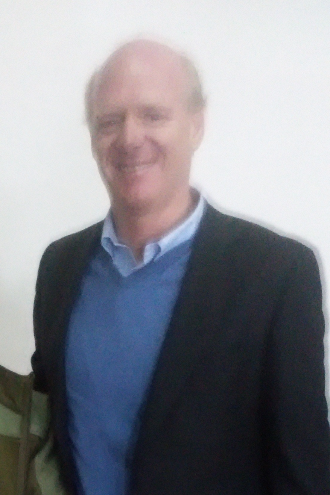 Primer candidato a Astronauta chileno